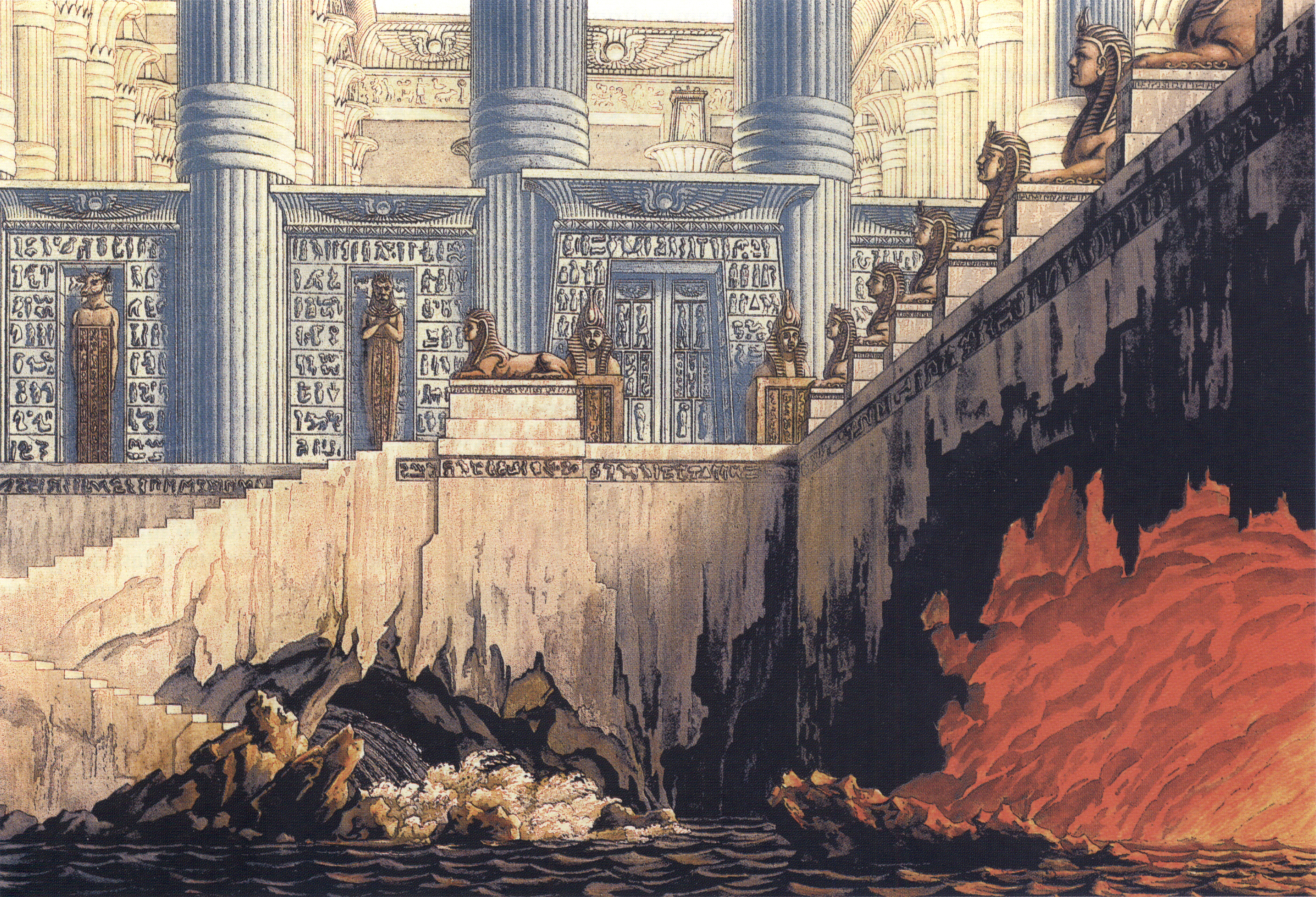 Szenenentwurf zu Mozarts "Zauberflöte", Feuer- und Wasserprobe, von Karl Friedrich Schinkel, Kgl. Opernhaus Berlin, 1817 Theaterwissenschaftliche Sammlung der Universität zu Köln (Schloss Wahn)